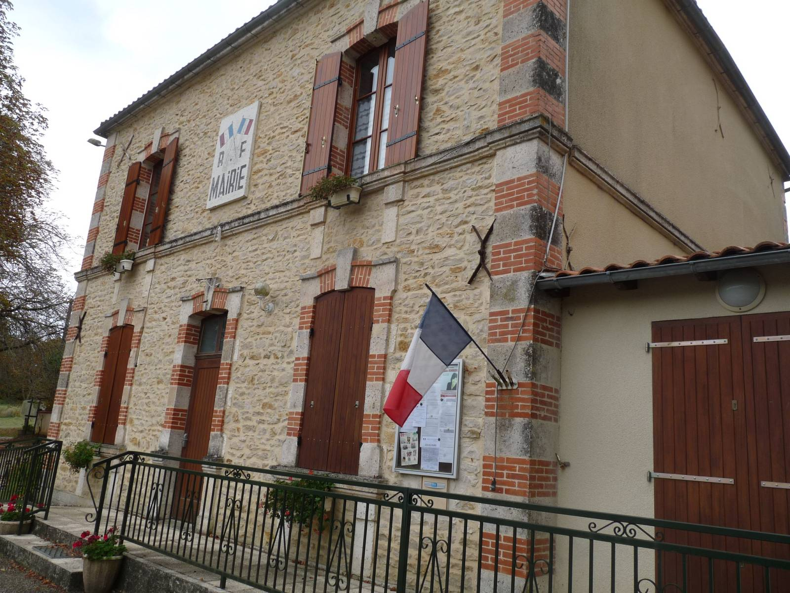 mairie de Vieux-Ruffec, Charente, France